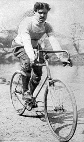 le Belge René Vermandel (1921, vainqueur des Tour des Flandres et de Belgique).